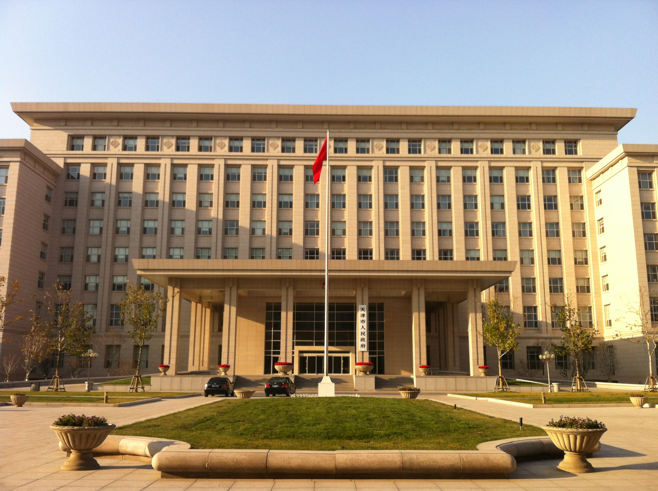 天津市人民政府正面